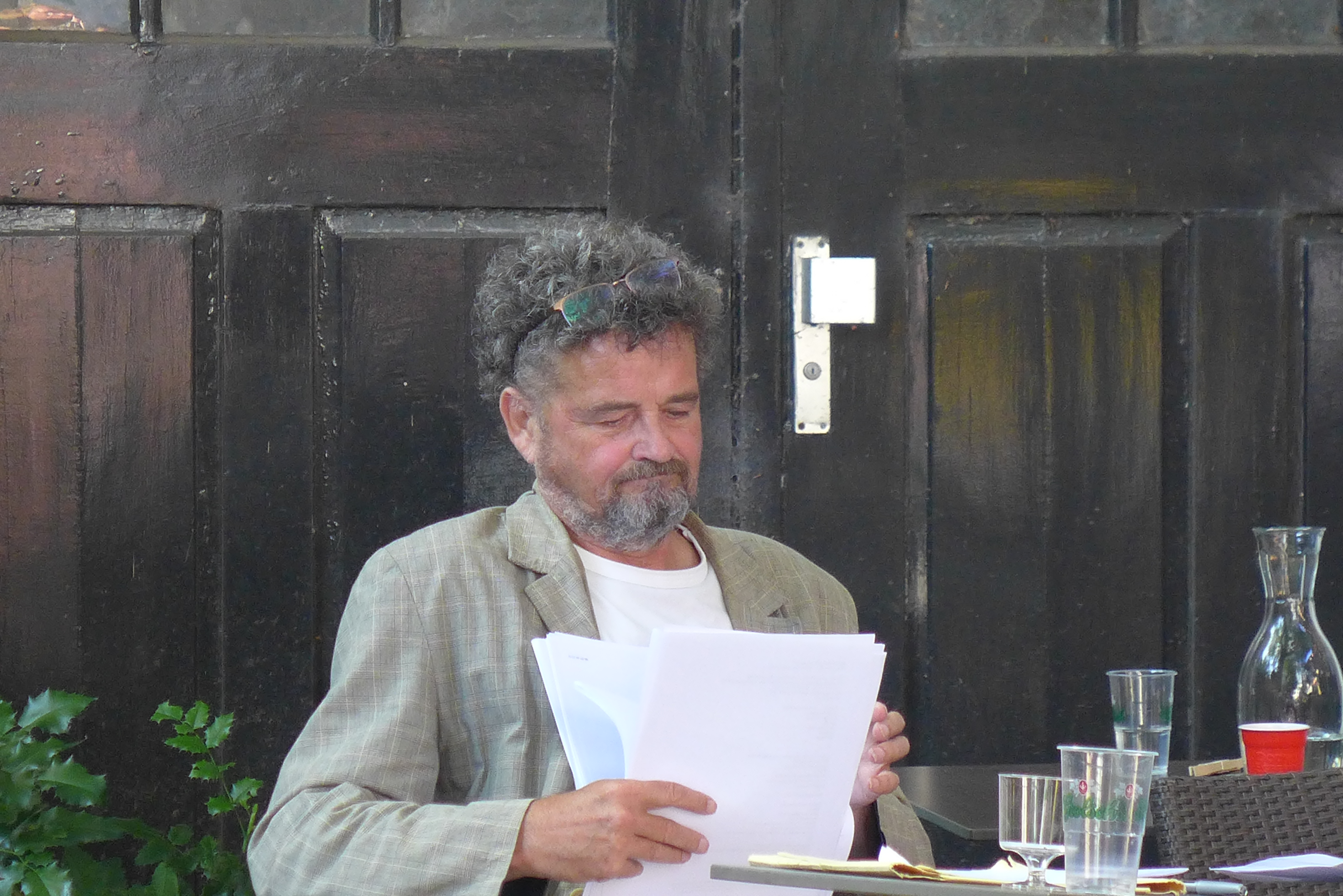 Tonnus Oosterhoff op het poëziefestival Het Tuinfeest in Deventer, 6 augustus 2016